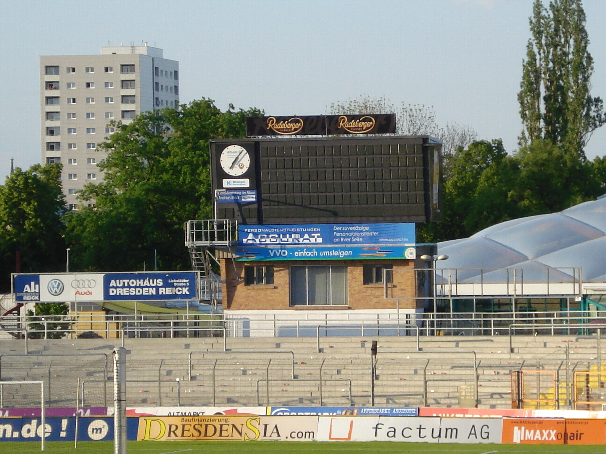 Dynamo Stadium (Dresden)